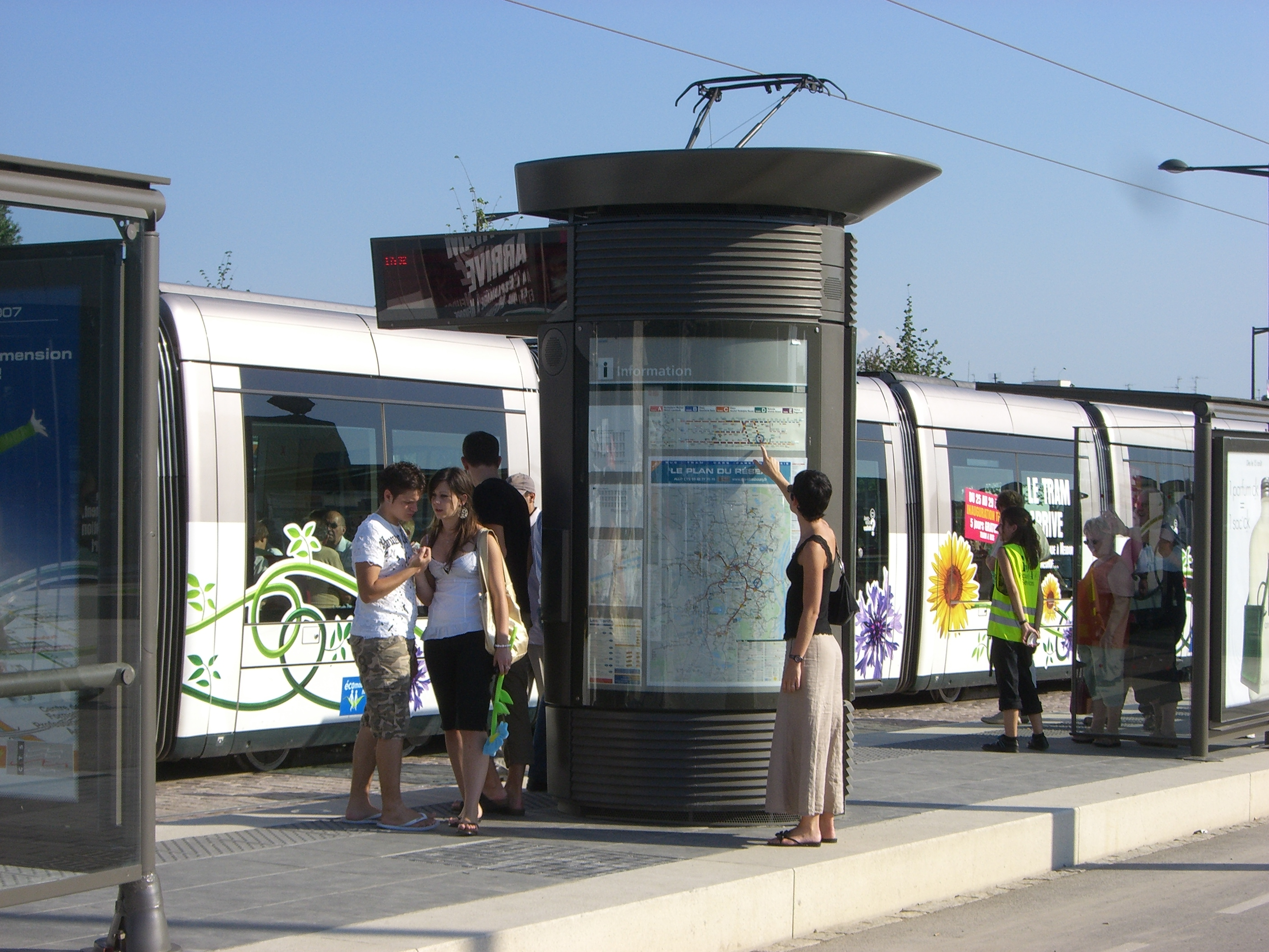 Strasbourg - Straßenbahn - Informationssäule.jpg